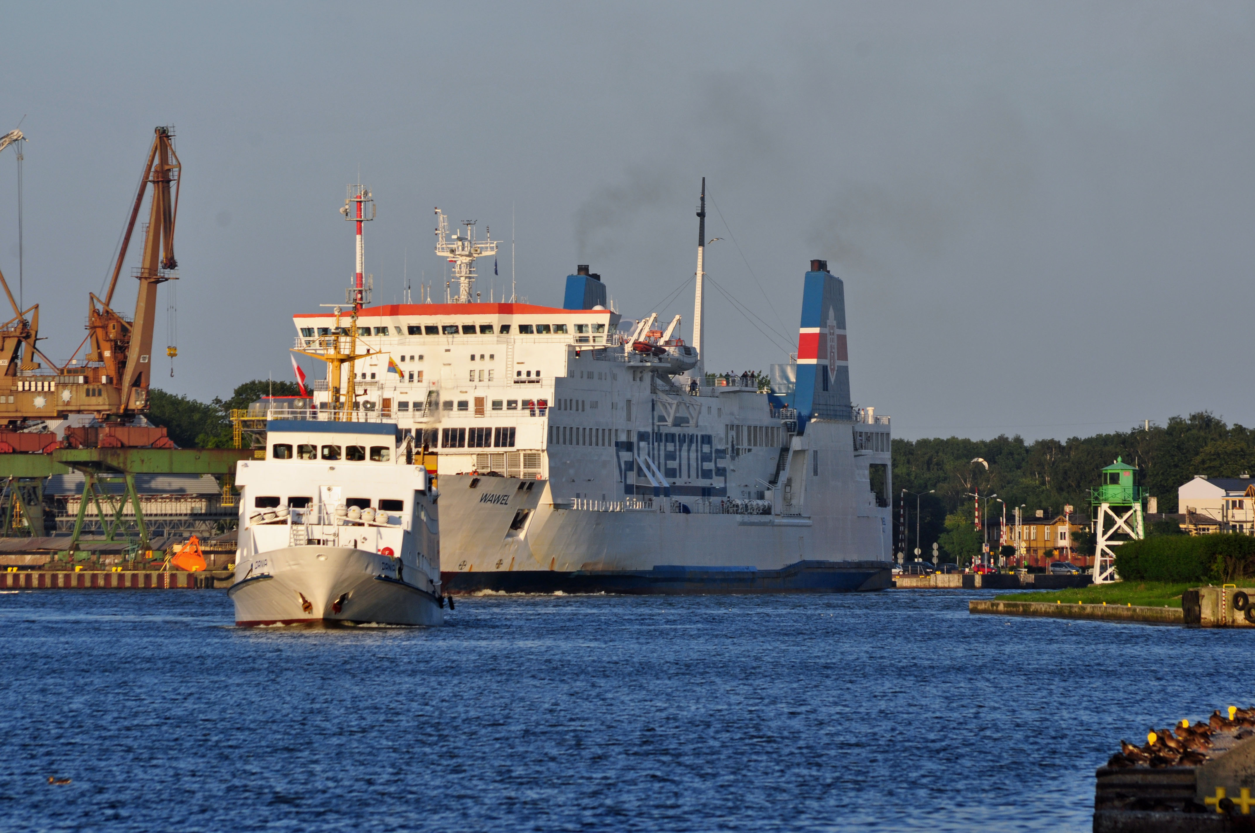 Świnoujście, am Hafen, v (2011-08-03) by Klugschnacker in Wikipedia